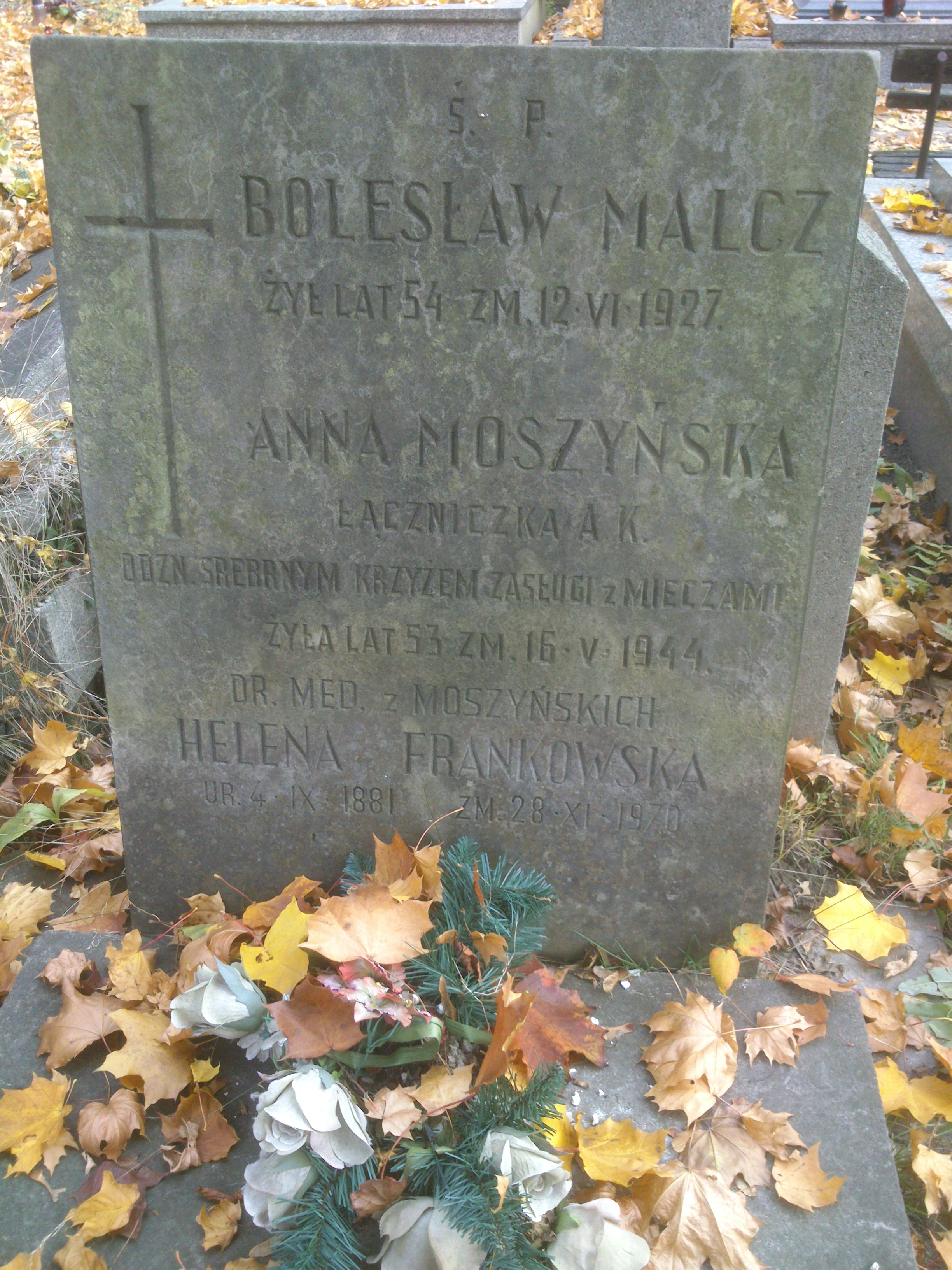 Płyta nagrobna grobu, w którym jest pochowany Bolesław Malcz